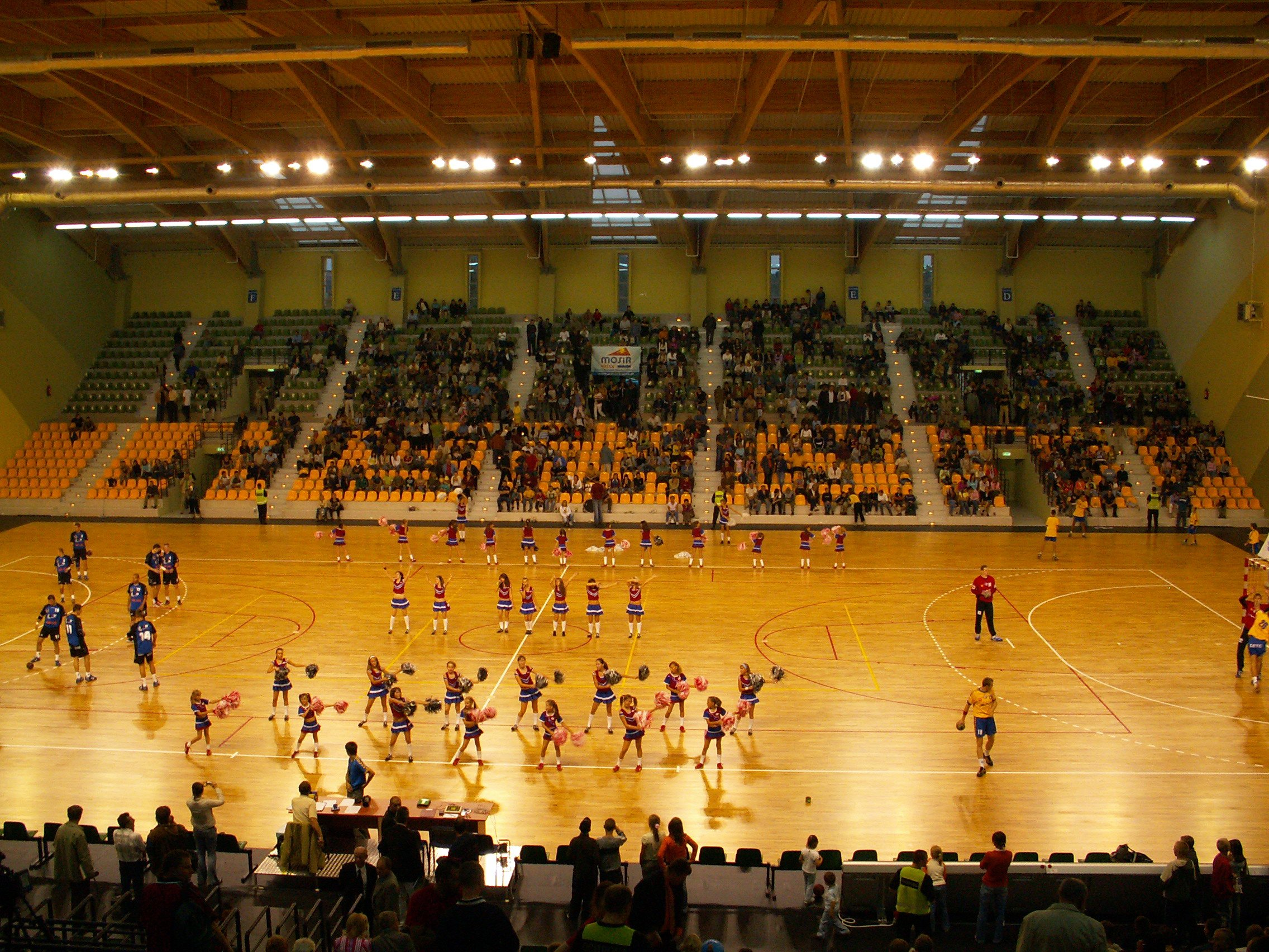 Hala Legionów w Kielcach. Sport Hall in Kielce (Poland)